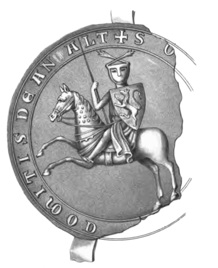 Bruchstück des Siegels des Fürsten Bernhard I. von Anhalt-Bernburg (Original veröffentlicht im Codex diplomaticus anhaltinus, Band 2)